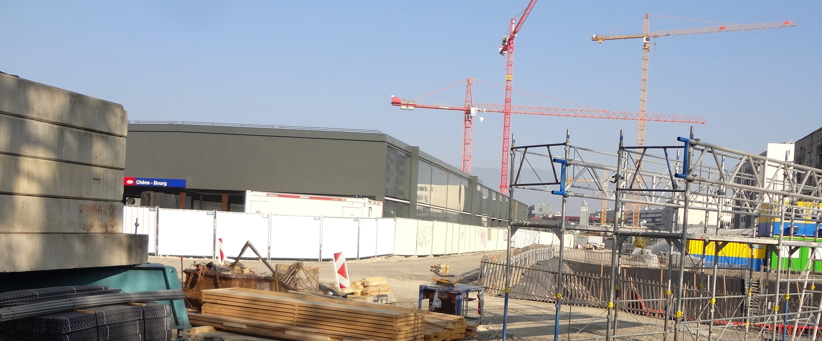 Travaux du CEVA à la gare de Chêne-Bourg. État en octobre 2018. Superstructures de la nouvelle gare.